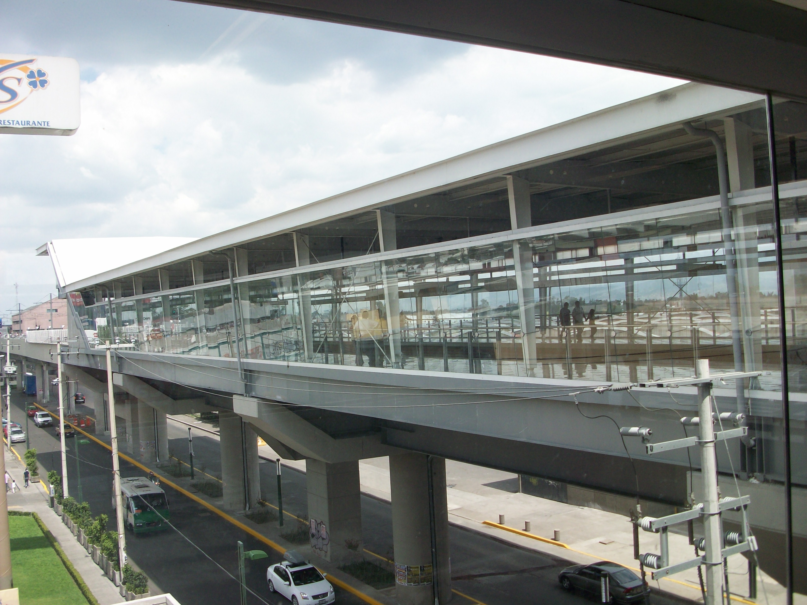 Edificio de andenes